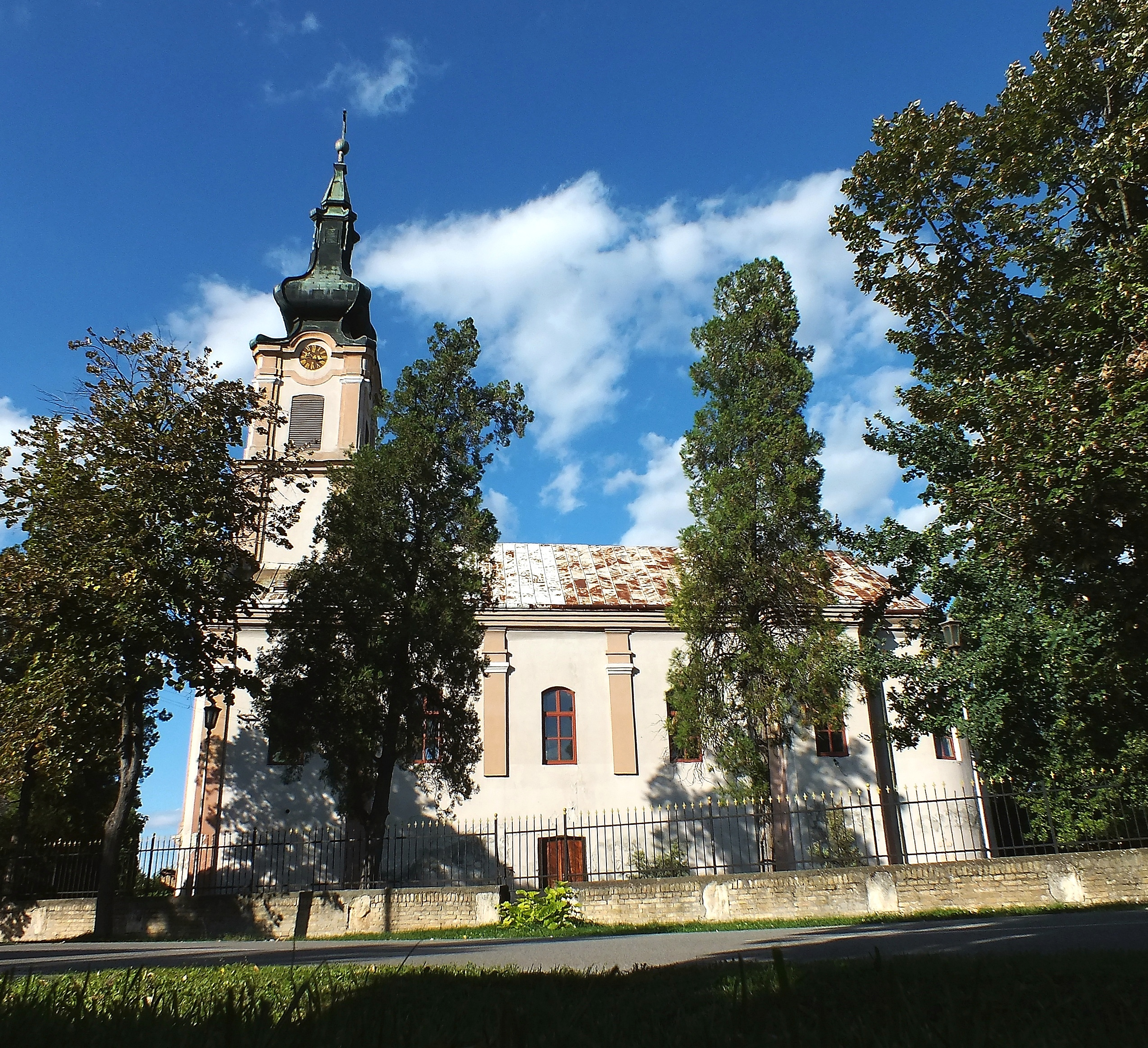 Srpskohrvatski / српскохрватски: Crkva Vavedenja presvete Bogorodice u Vrbasu